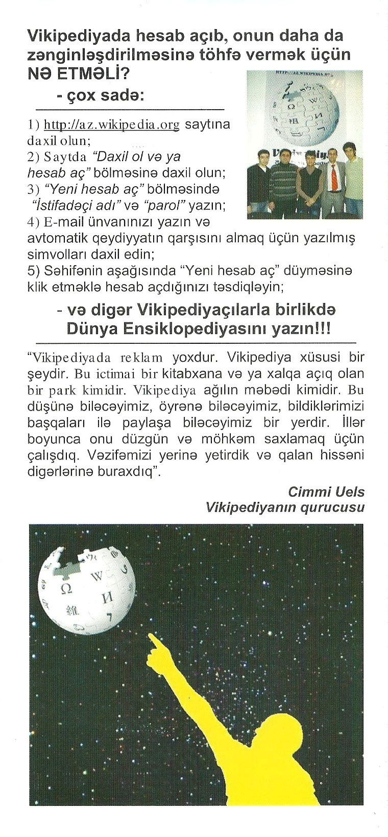 Vikipediya-Azərbaycan İB-nin ilk bukleti